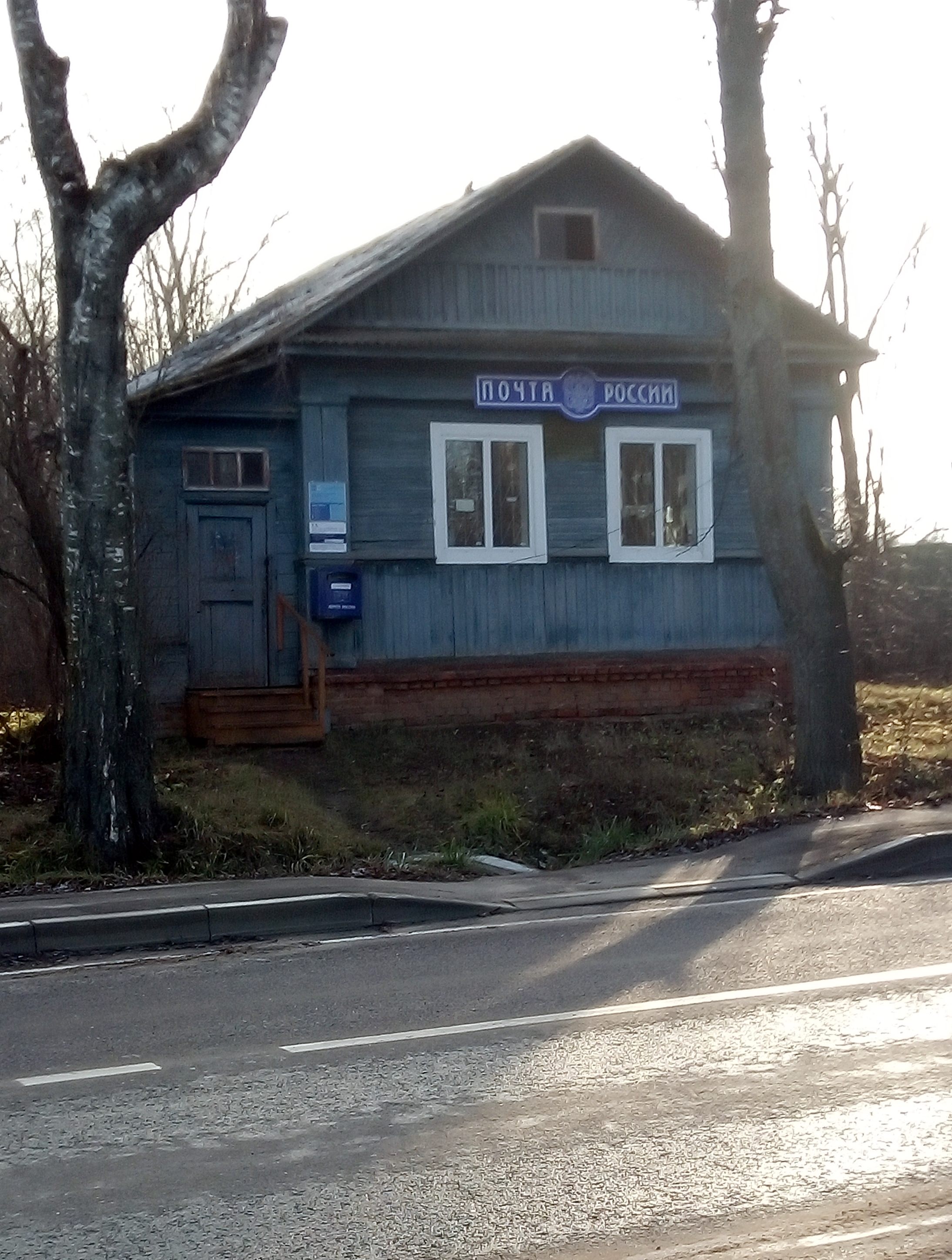 Почта 141890.